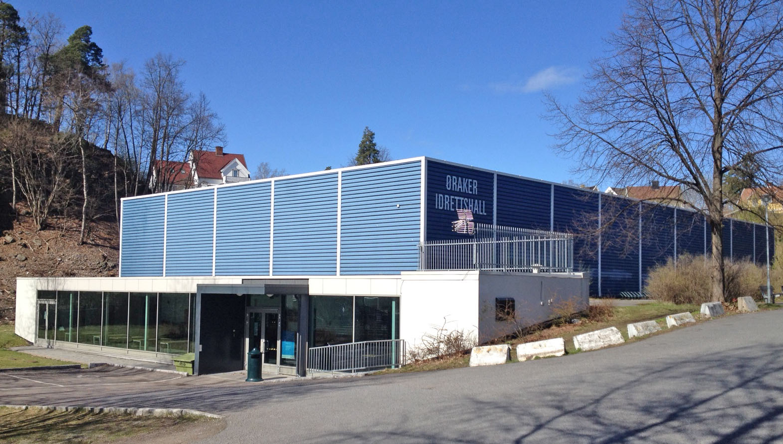 Øraker idrettshall, Oslo 2014